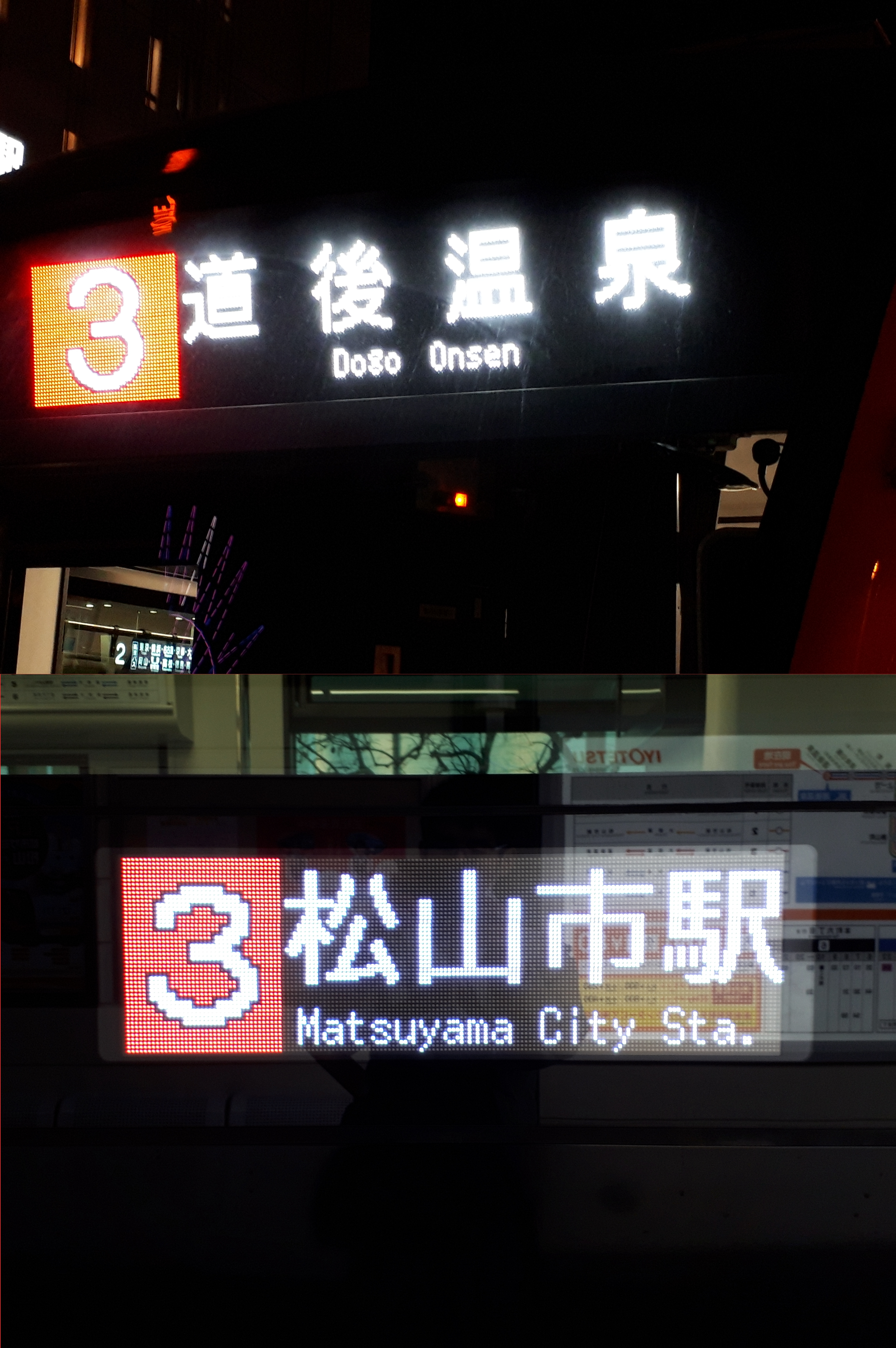 モハ5000形の行き先表示。 上が前面の行き先表示で、下が側面の行き先表示